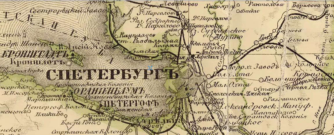 Железные дороги Санкт-Петербурга в 1897 году